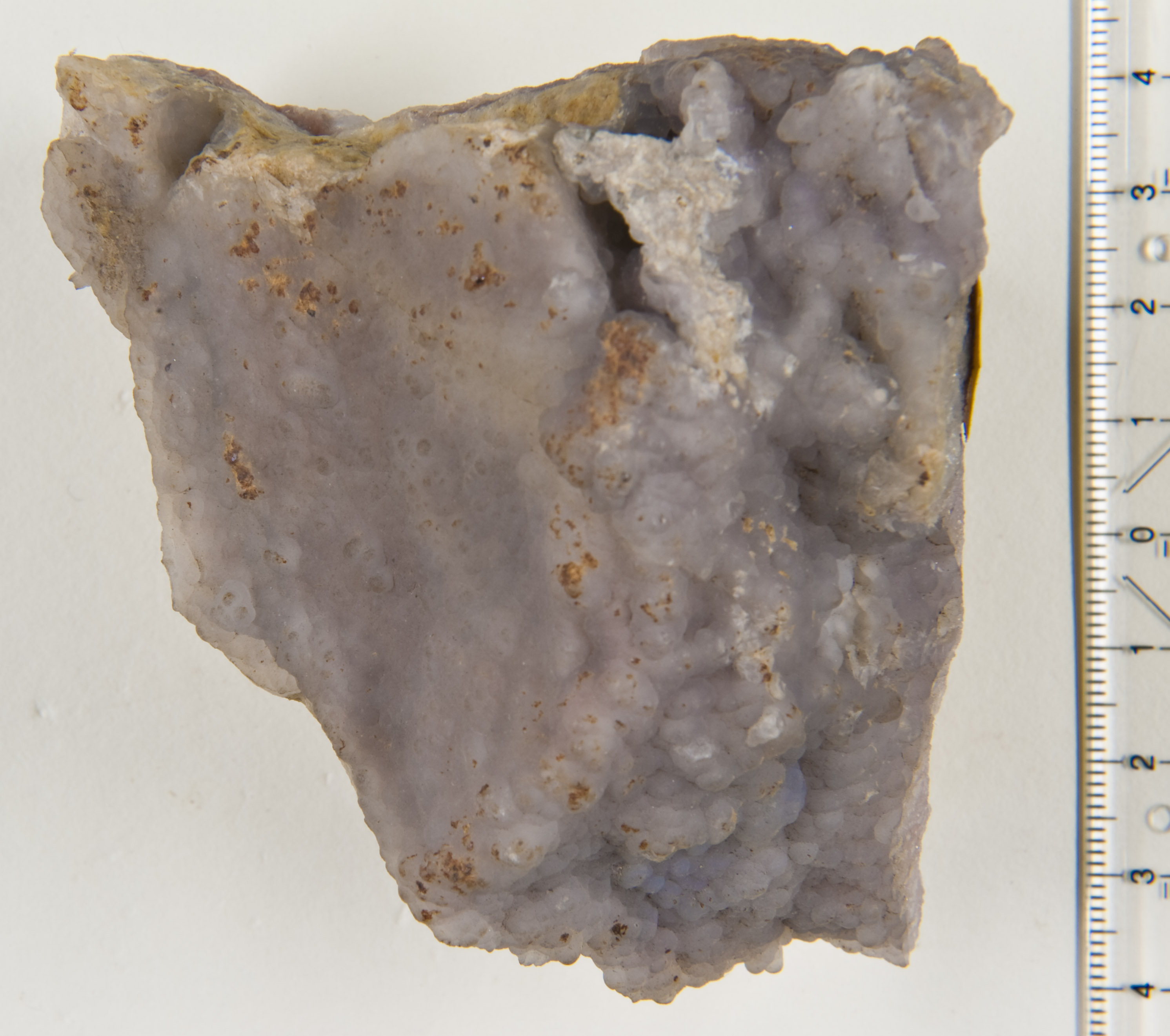 Chalcedony - Bergwerk Knappenberg, Kärnten, Germany